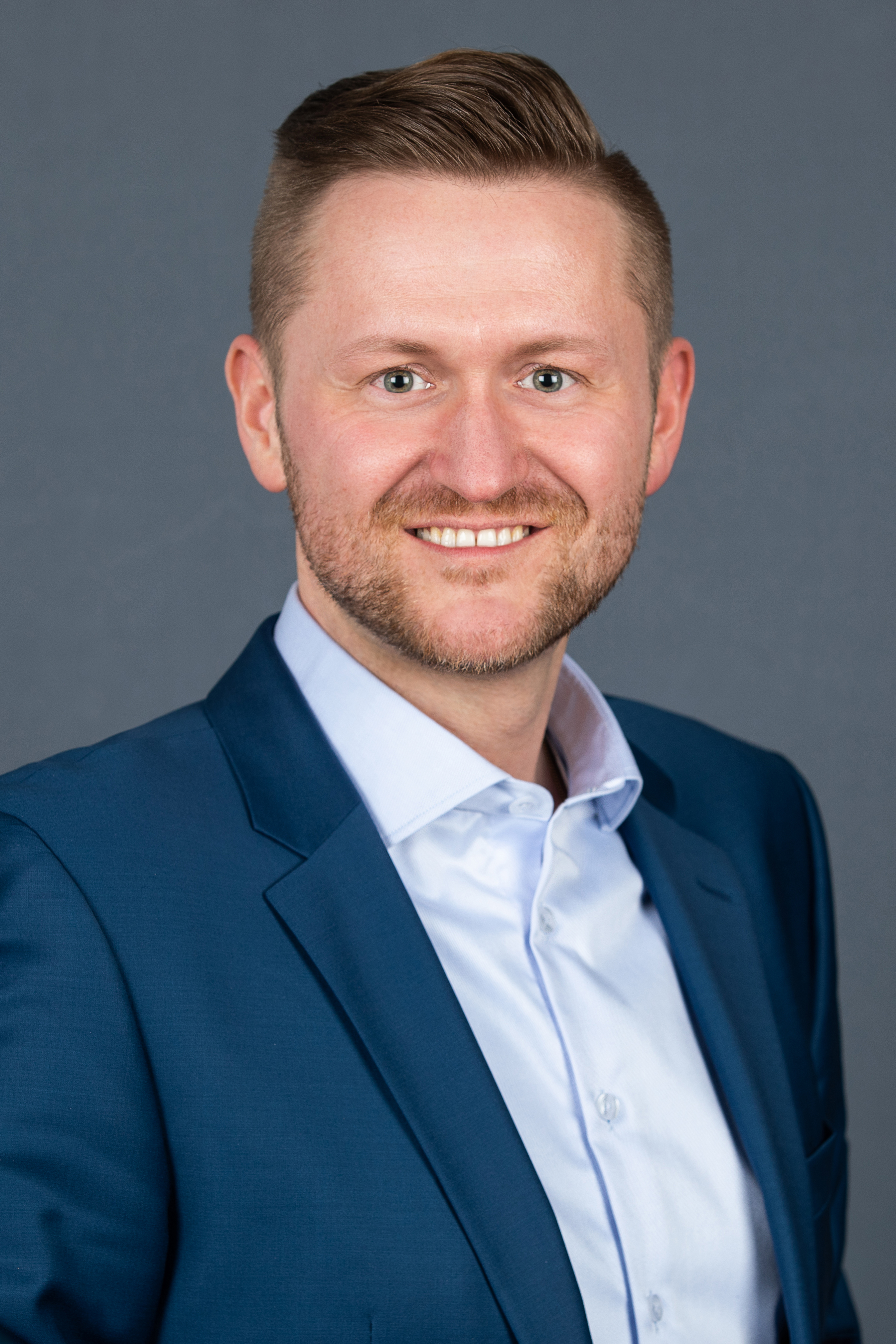 Wolfgang Stefinger (CSU)